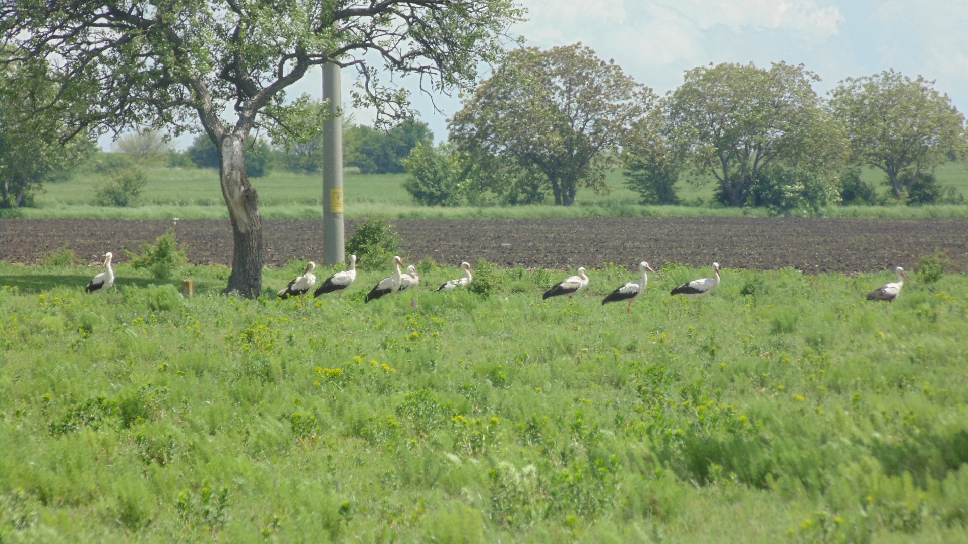 Бели щъркели в Кабиюк